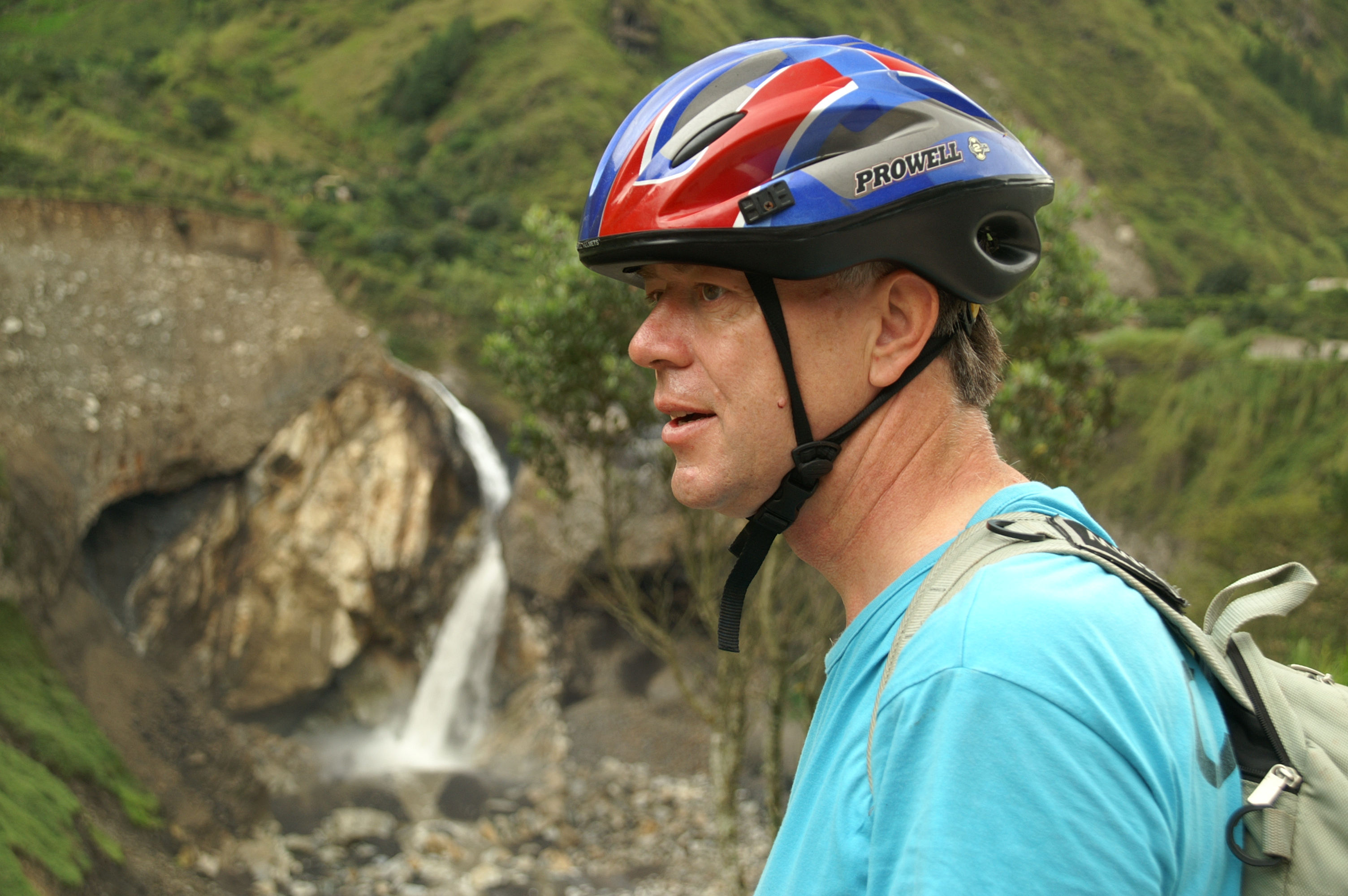 Leen Verbeek, vakantie 2007